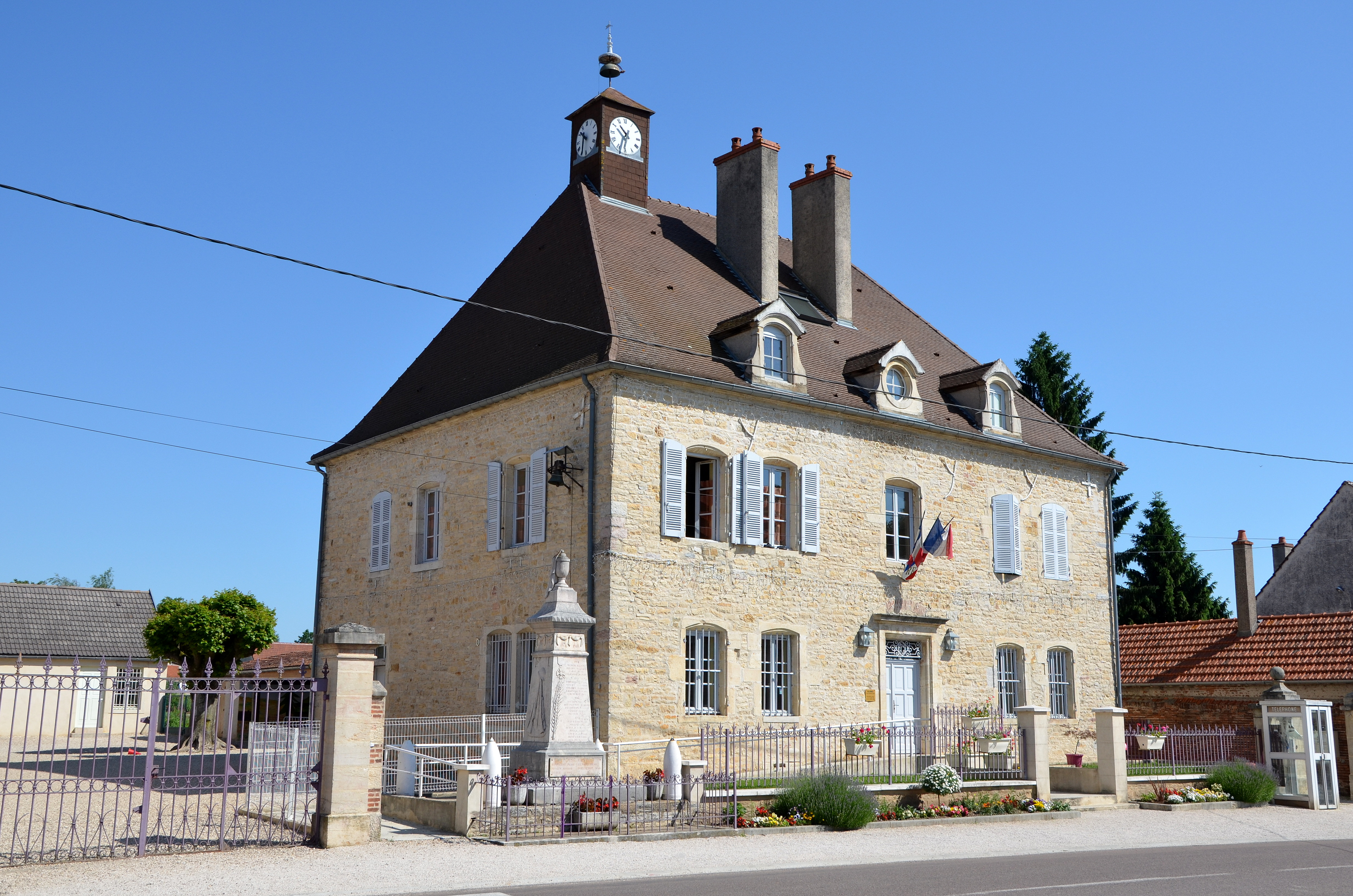 Mairie de Bonnencontre, Côte d'Or, Bourgogne, France